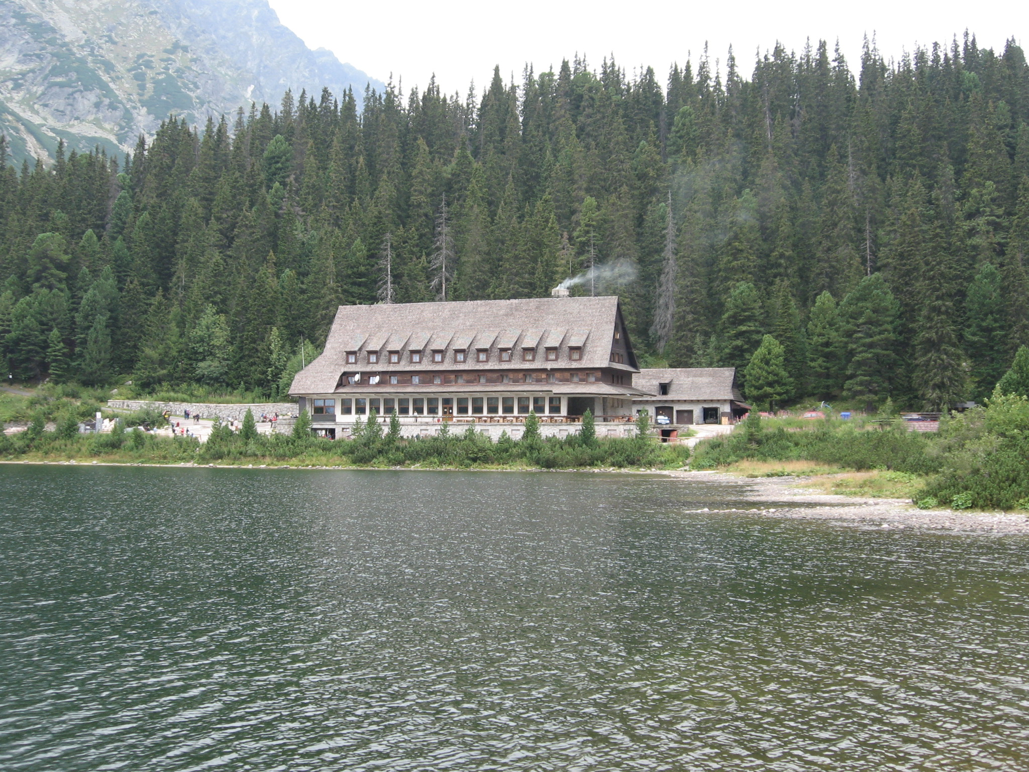 Chata pri Popradskom plese